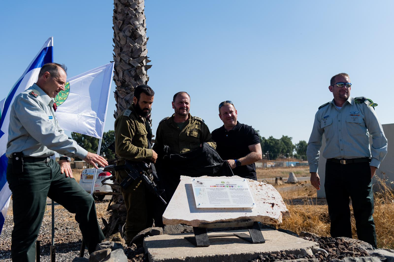 נ.צ. 773681 / 269077 -9999 מ' ישראל נענתה לבקשת מדינות המערב, כולל הנשיא טראמפ, וקיימה מבצע סיוע הומניטרי נרחב להצלת חברי "הקסדות הלבנות" ב"עוצבת הבשן". ב-22 ביולי 2018 חולצו אנשי "הקסדות הלבנות" ומשפחותיהם משטח הלחימה בדרום סוריה, לירדן. למרגלות רכס חזקה שברמת הגולן, נפתחה מנהלת "שכנות טובה" וחטיבת קשרי החוץ (קש"ח) את שערי הגדר ממנו חולצו "הקסדות הלבנות". משם, הועברו באוטובוסים דרומה, והועברו לירדן דרך מעבר שייח חוסיין. נקודת פינוי נוספת נמצאה סמוך למוצב 105 שבצפון רמת הגולן. אבן הפינה הוקמה במסגרת פרויקט "חץ הדורות", להנצחת מורשת שיתופי הפעולה של צה״ל עם צבאות זרים.